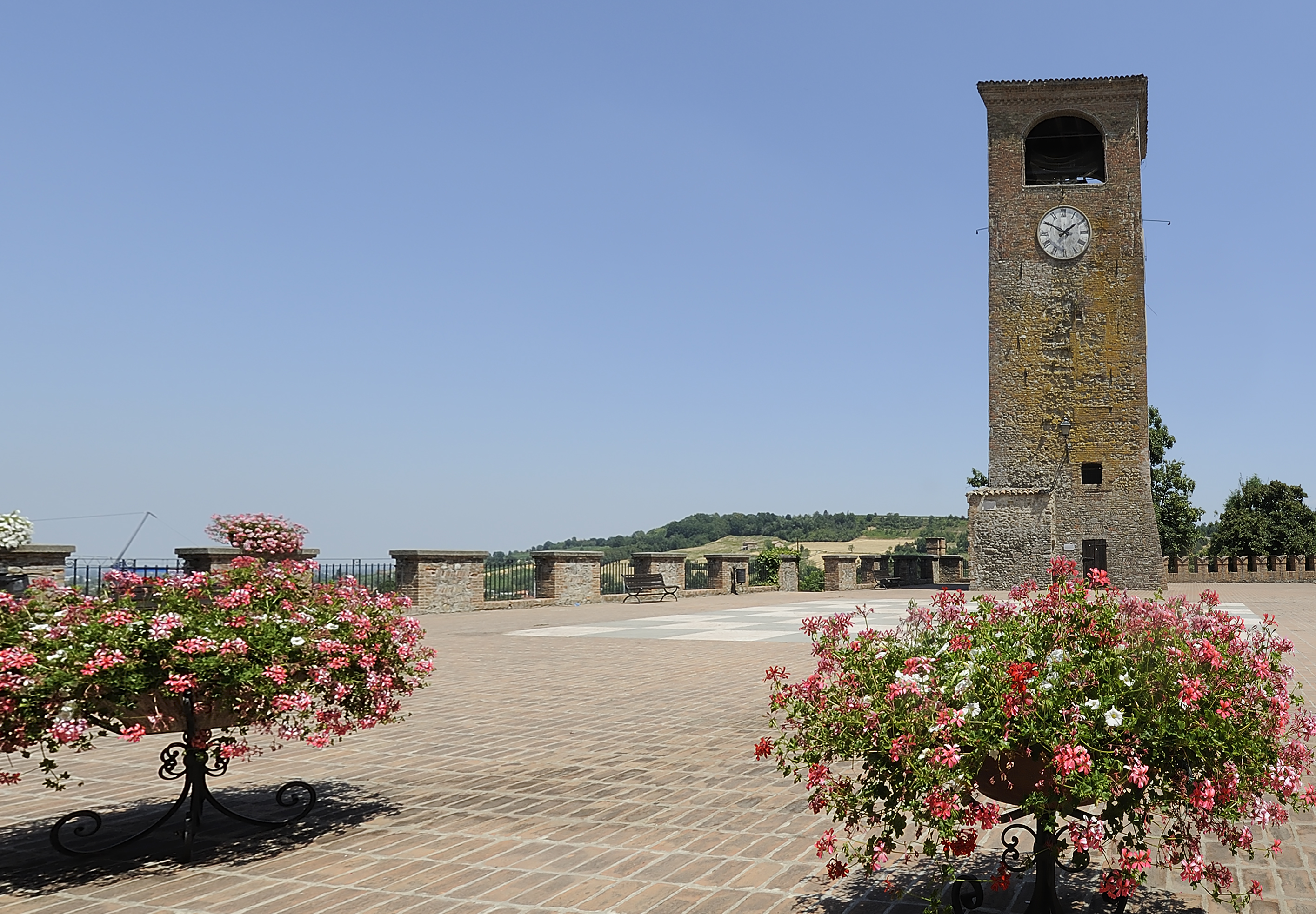 Torre dell'Orologio - MIBAC This is a photo of a monument which is part of cultural heritage of Italy.